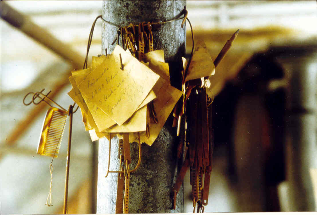 Die Tuchfabrik Müller (heute: LVR-Industriemuseum Euskirchen) verfiel nach der Betriebsschließung 1961 in einen "Dornröschenschlaf". Ende der 1980er Jahre sah es in dem Betrieb noch so aus wie vor 30 Jahre zuvor. Hier Notiz-Zettel und Arbeitsutensilien (Kamm, ein Bleistiftstummel in einer Papphülse, Bestandteile des Webgeschirrs)an einer Säule in der Weberei.